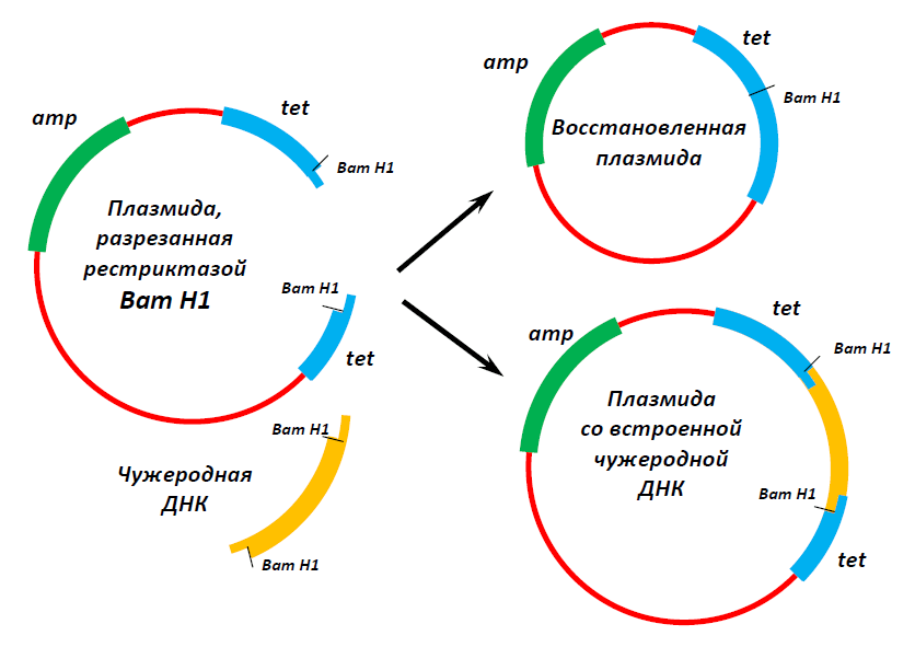 Два варианта взаимодействия пластиды, разрезанной рестриктазой, с фрагметном чужеродной ДНК: 1) Нет взаимодействия, пластида восстанавливается в исходном виде, обеспечивая бактерии устойчивость к тетрациклину и ампициллину; 2) Чужеродная ДНК встраивается в пластиду, блокируя тем самым ген устройчивости к тетрациклину.